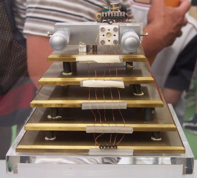 Scanning Tunneling Microscope in Schwingungs-Dämpfplatten